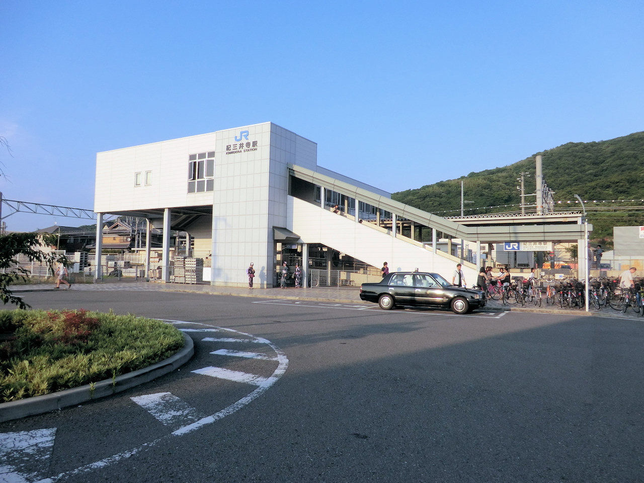 紀三井寺駅